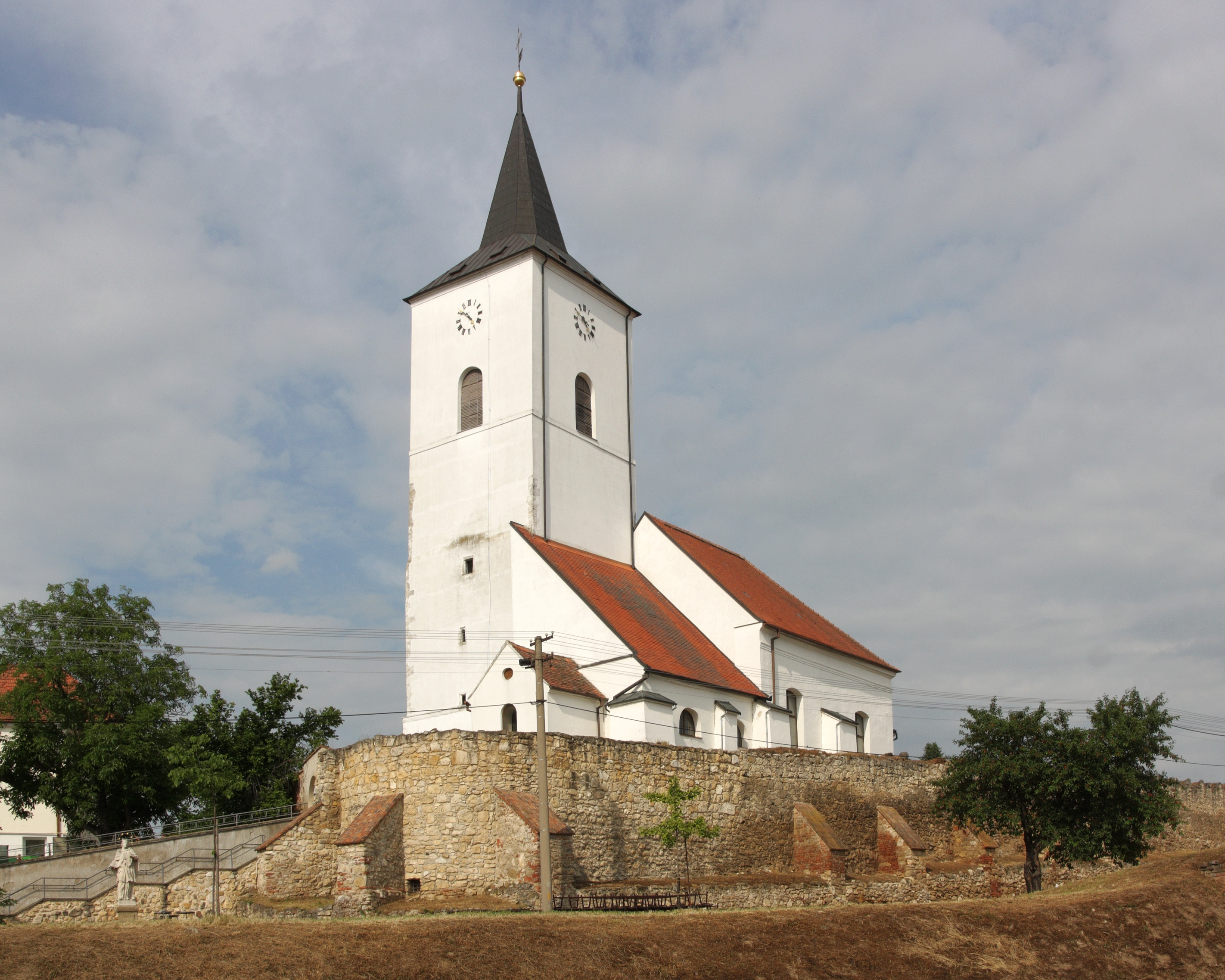 Nosislav - kostel sv. Jakuba Staršího, JZ pohled.